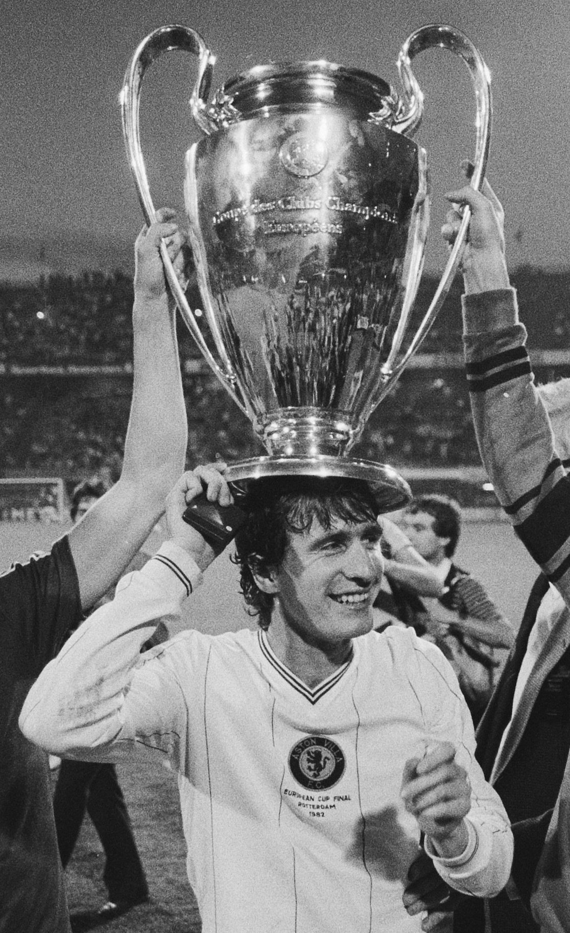 Collectie / Archief : Fotocollectie Anefo Reportage / Serie : [ onbekend ] Beschrijving : FC Bayern Munchen tegen Aston Villa 0-1 Europa Cup I blijde Aston Villa spelers met de Cup Datum : 26 mei 1982 Trefwoorden : sport, voetbal Persoonsnaam : Aston Villa, CUP, FC Bayern Munchen Fotograaf : Antonisse, Marcel / Anefo Auteursrechthebbende : Nationaal Archief Materiaalsoort : Negatief (zwart/wit) Nummer archiefinventaris : bekijk toegang 2.24.01.05 Bestanddeelnummer : 932-1808